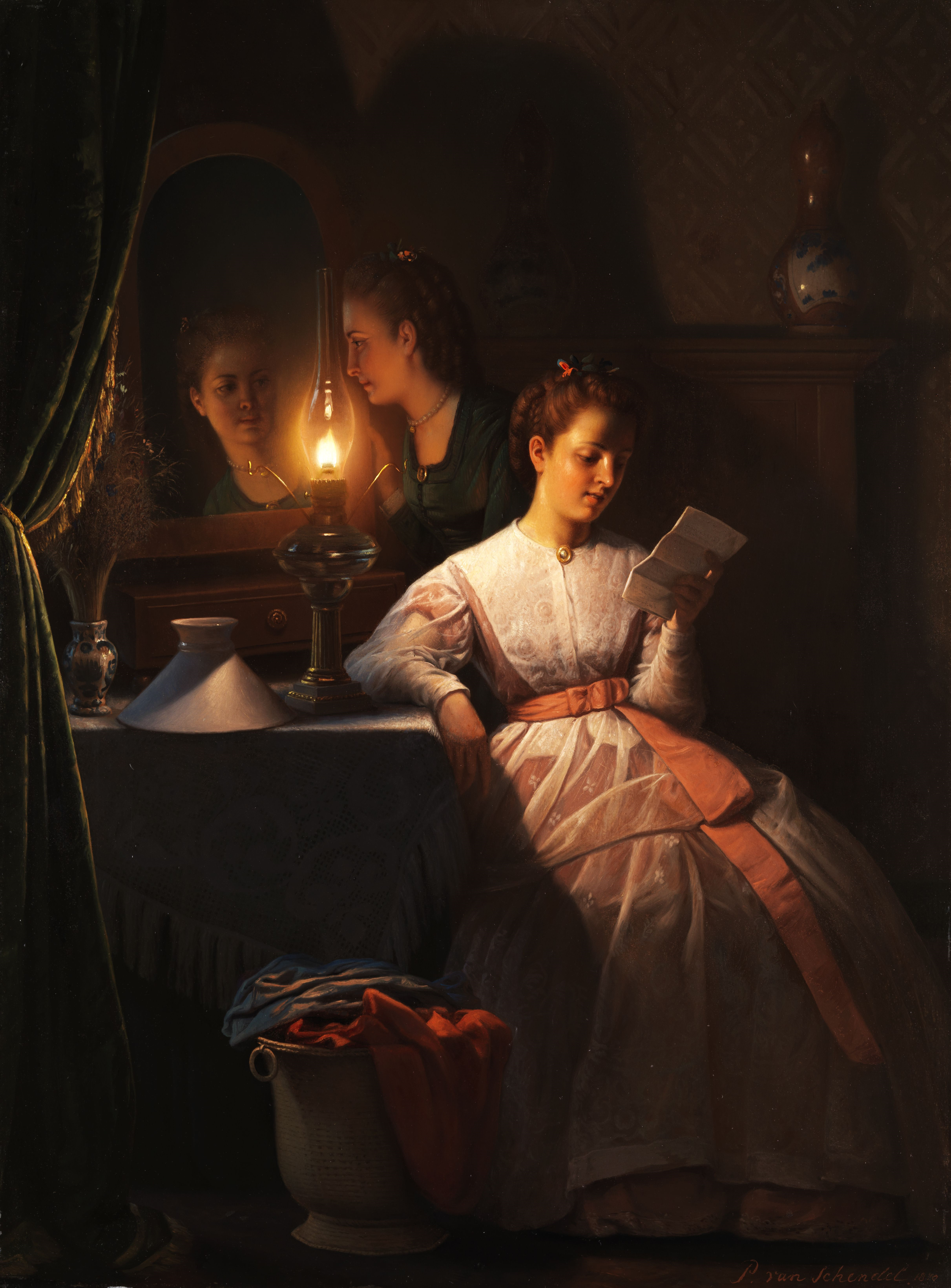 Der Liebesbrief. Öl auf Holz. 63 x 46 cm.